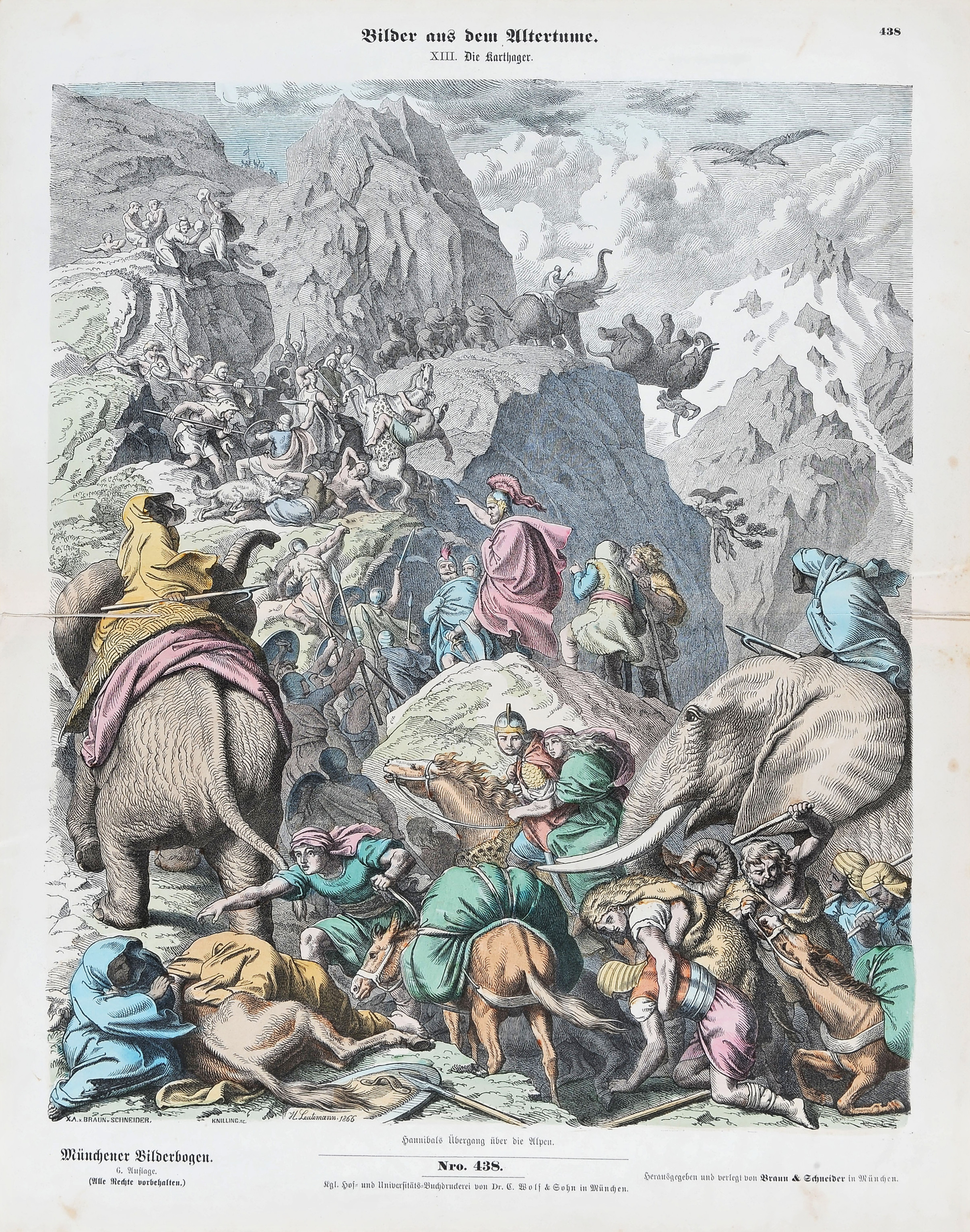 Kolorierter Holzschnitt Die Karthager – Hannibals Übergang über die Alpen von Heinrich Leutemann, erschienen im Münchener Bilderbogen (Blatt 13 der „Bilder aus dem Altertume“; Nr. 438)